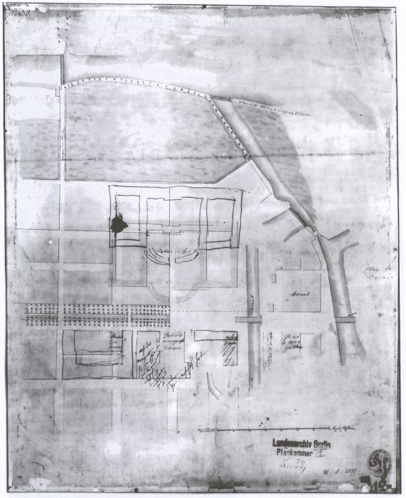 DasForum Fridericianum in Berlin. Plankorrekturen durch Friedrich II.